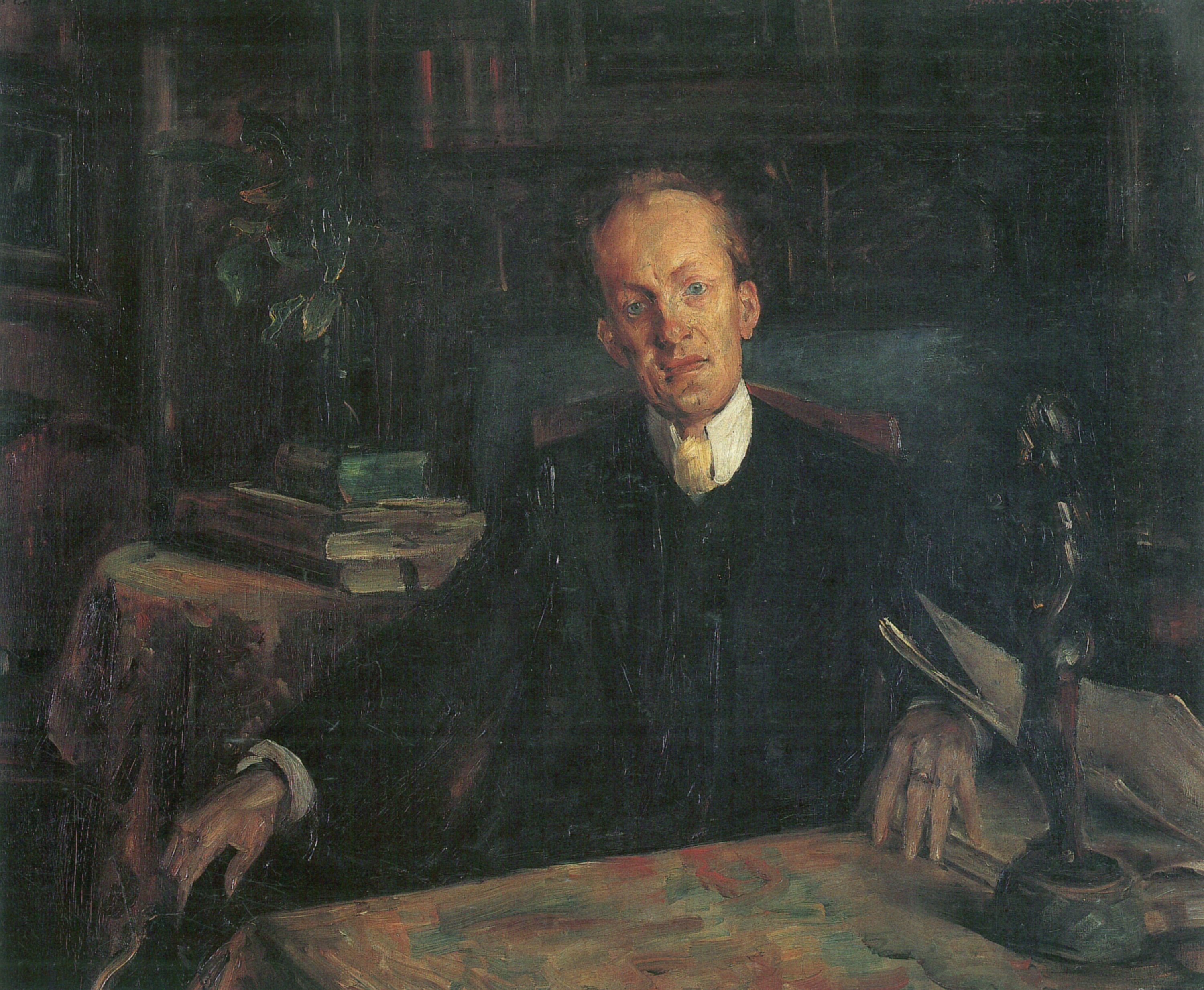 Portrait of Gerhart Hauptmann (1862–1946)